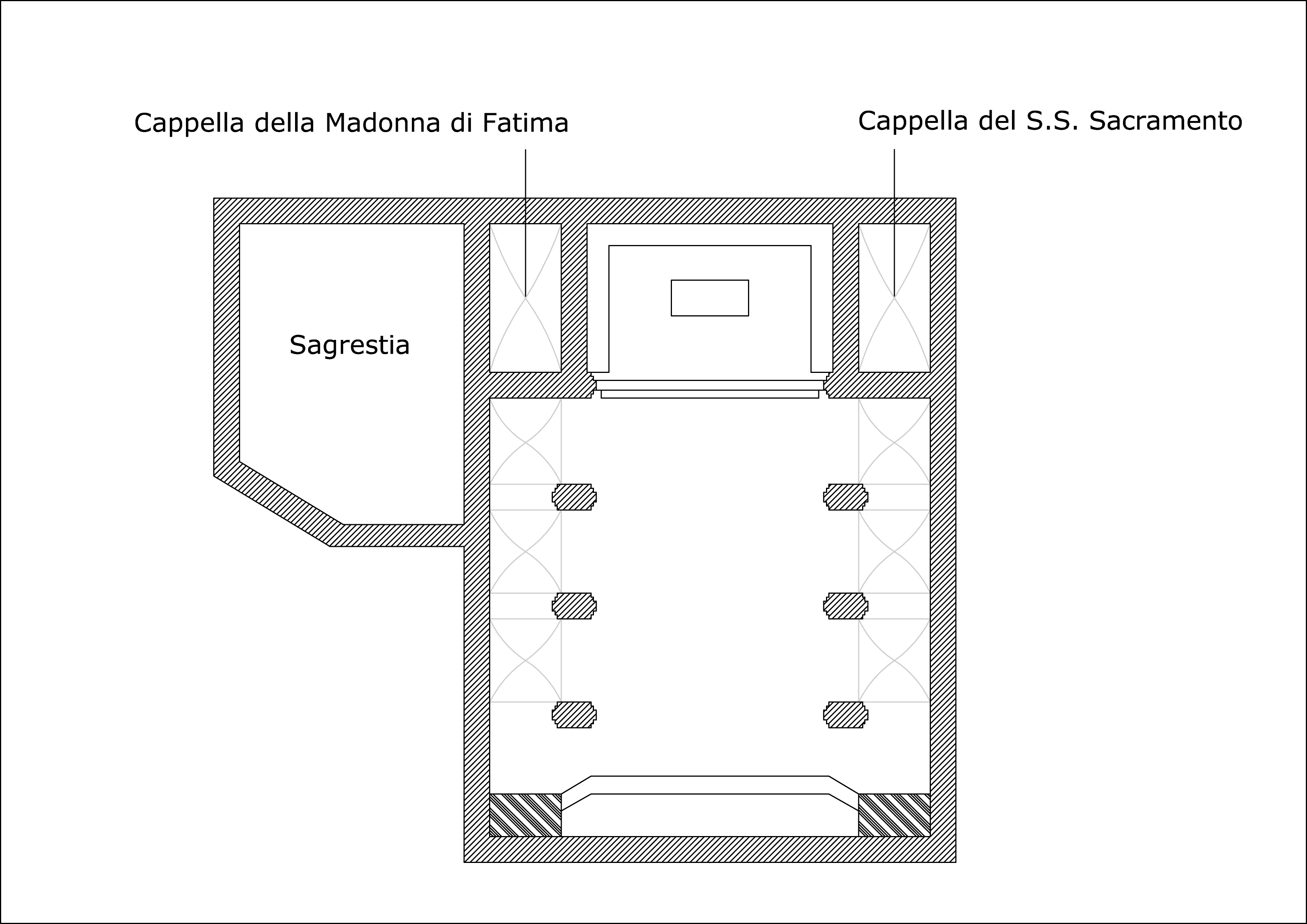 San Giovanni in Fiore - Chiesa Madre, planimetria